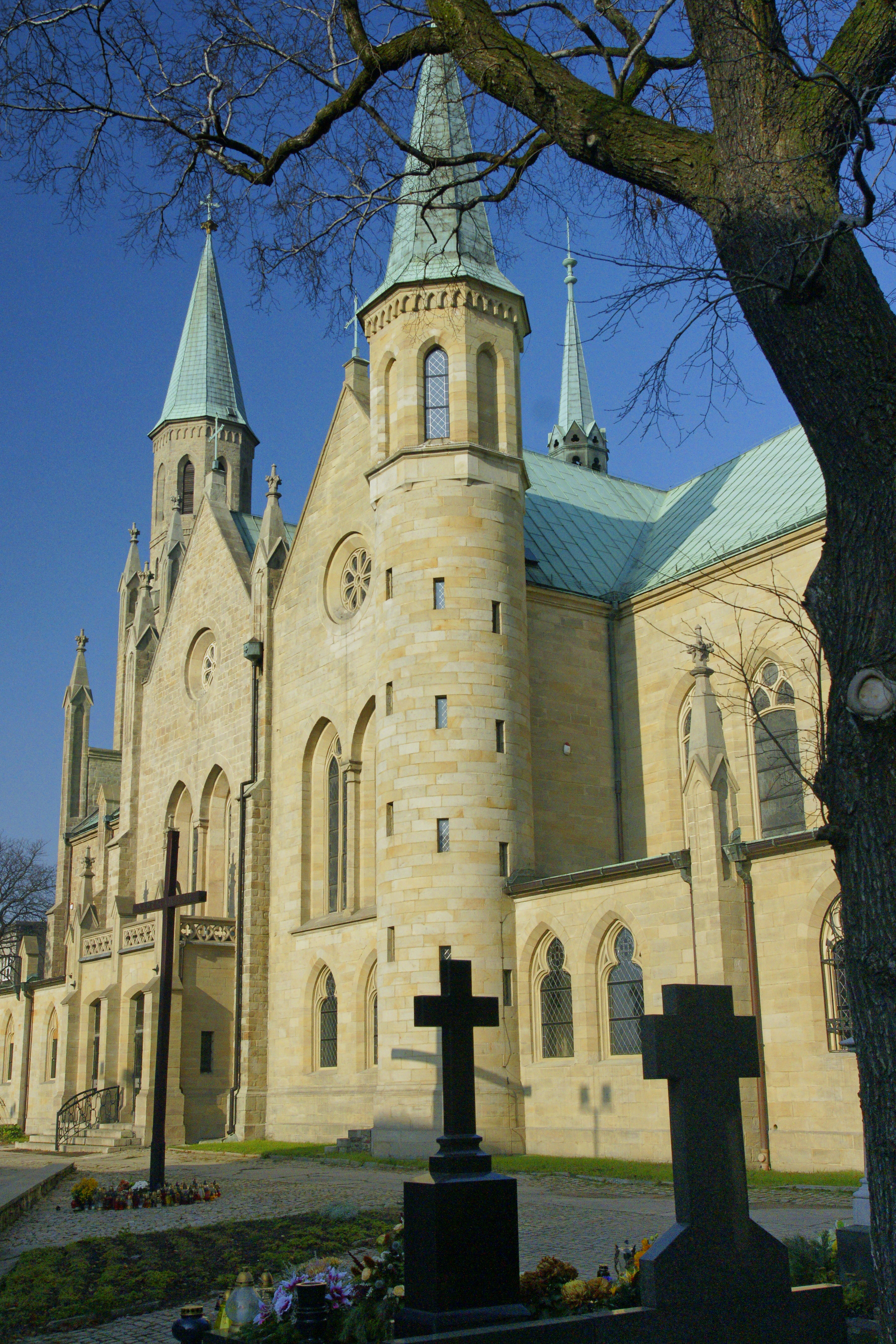 Kościół pod wezwaniem Św Barbary Chorzów ul. 3 Maja 18 nr rej. 1235-78 z 08.09.1978